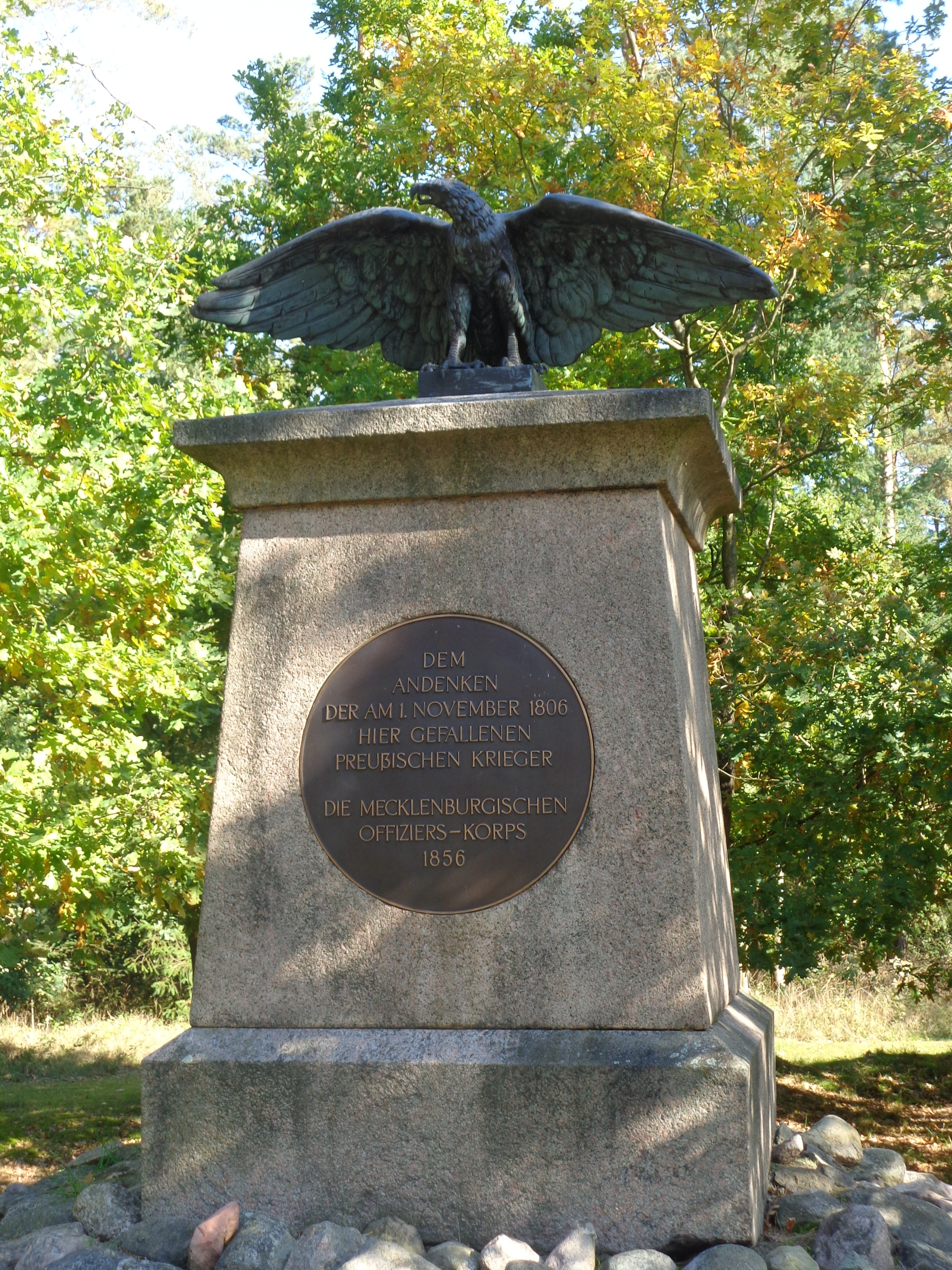 Denkmal für die Gefallenen des Gefechts bei Nossentin am 1. November 1806